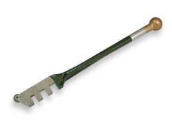 Imagen de un cortador de vidrio diamantado conocido como "Cortador Fletcher"